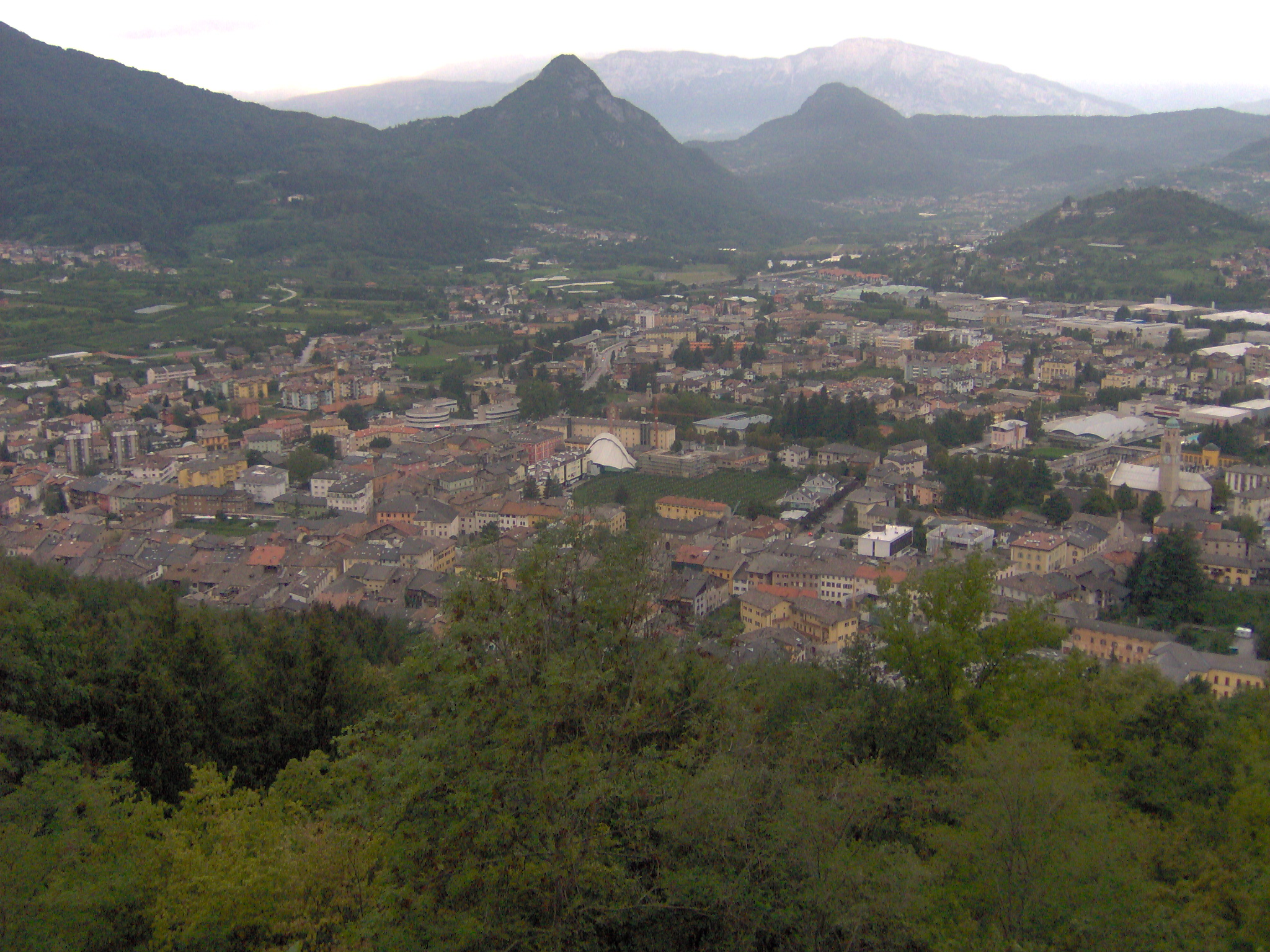 Image della provincia di Trento